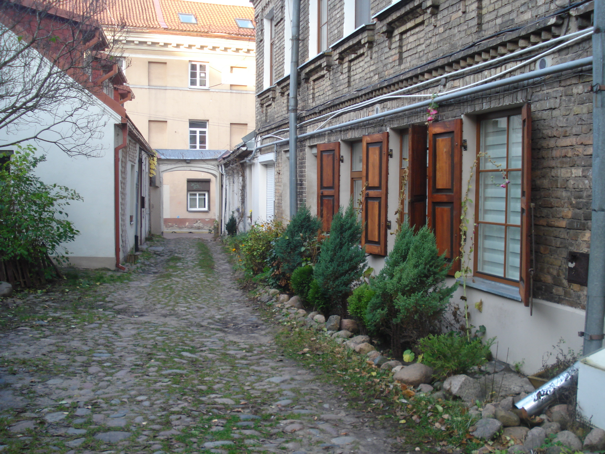 Двор на улице Шилтадаржё 4, Вильнюс